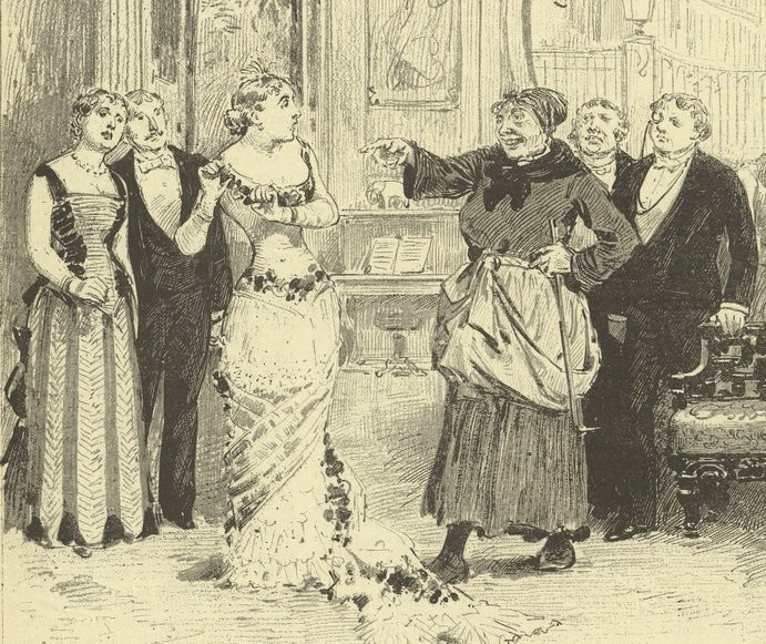 La chiffonnière Pomaré dans l’adaptation théâtrale de Nana par William Busnach (1881), acte 3, scène 12